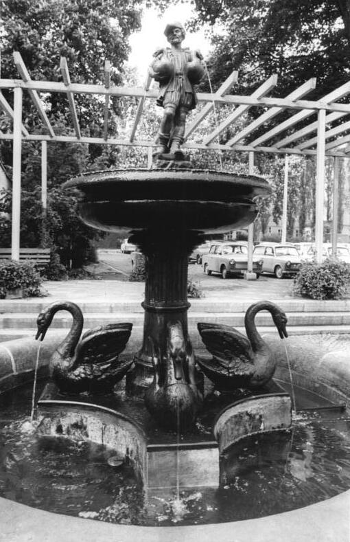 Weimar, Brunnen ADN-ZB Ludwig-16.8.1984-kb Bez. Erfurt: Brunnen- Der Gänsemännchenbrunnen gegenüber dem Schillerhaus in Weimar gehört zu den Schmuckstücken im Stadtzentrum. 1864 wurde das steinerne Kleinod als eine Nachbildung des Nürnbergers Originals von Pankraz Labenwolf aufgestellt. Die Anregung für die Brunnenfigur soll Goethe schon 1817 gegeben haben. (siehe auch 13N)